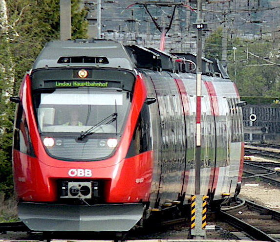 de: ÖBB 4024 in Bludenz auf der Fahrt nach Lindau Hbf en: ÖBB 4020 Talent (EMU) in Bludenz, Austria with destination Lindau, Germany